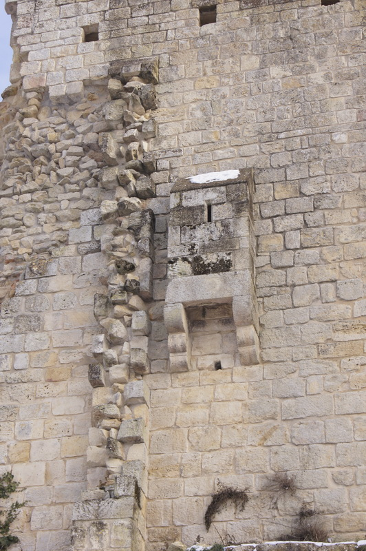 Château de Rauzan - Latrine